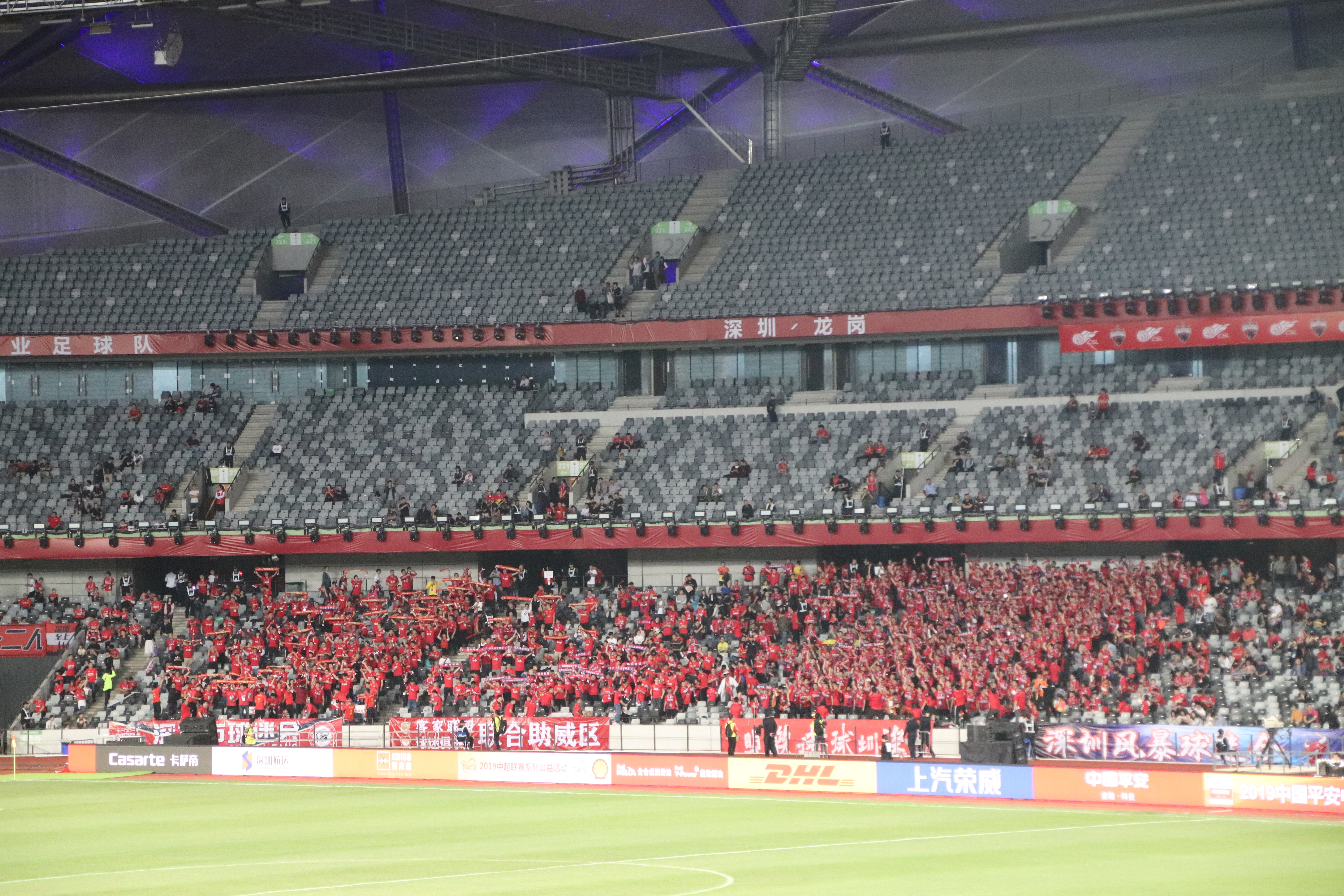 中文（中国大陆）: 这是深圳佳兆业主场球迷方阵